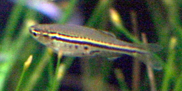 Dwarf danio Danio nigrofasciatus